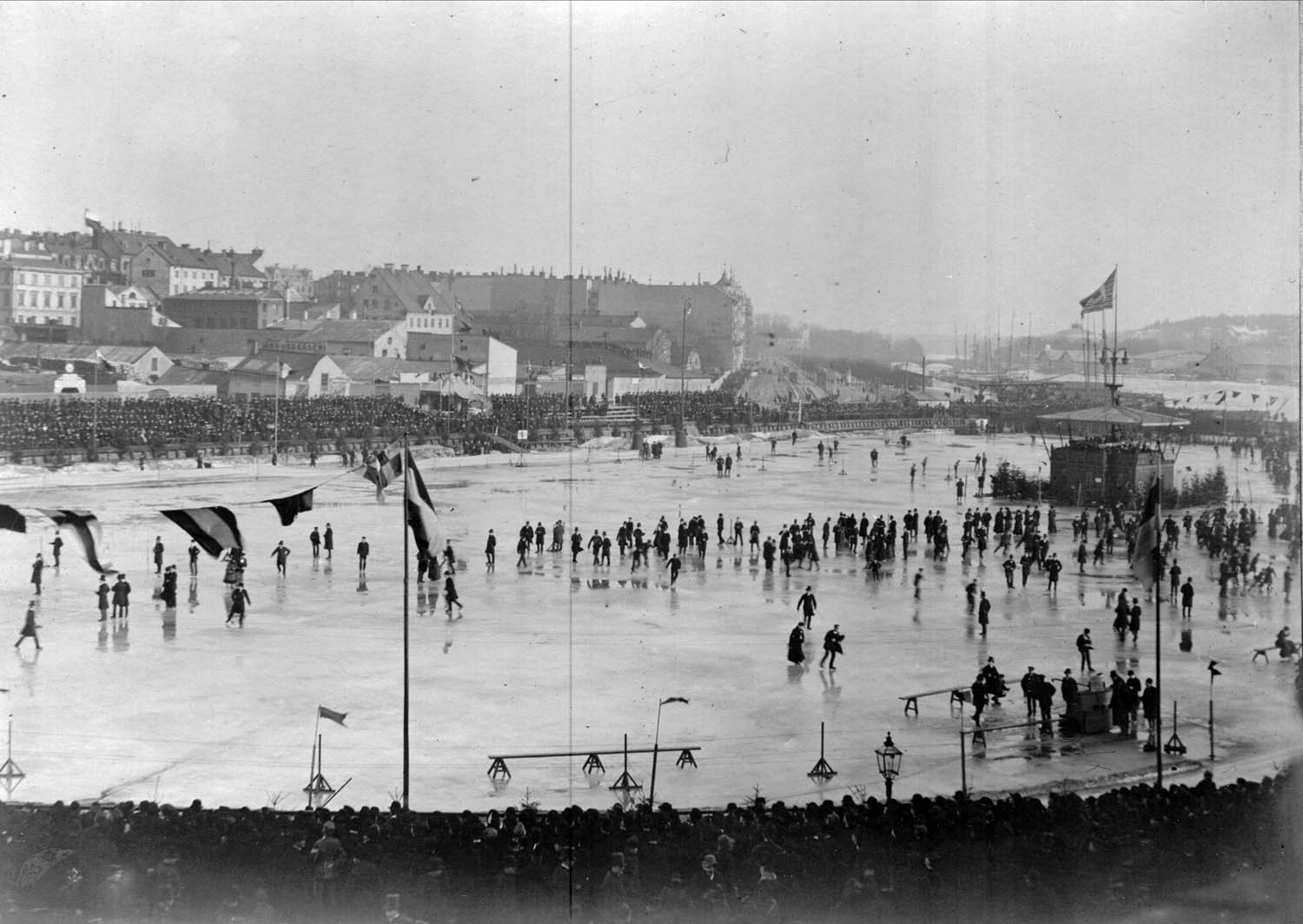 depicted place: Stockholm, N blasieholmshamnen (Sverige (SE))